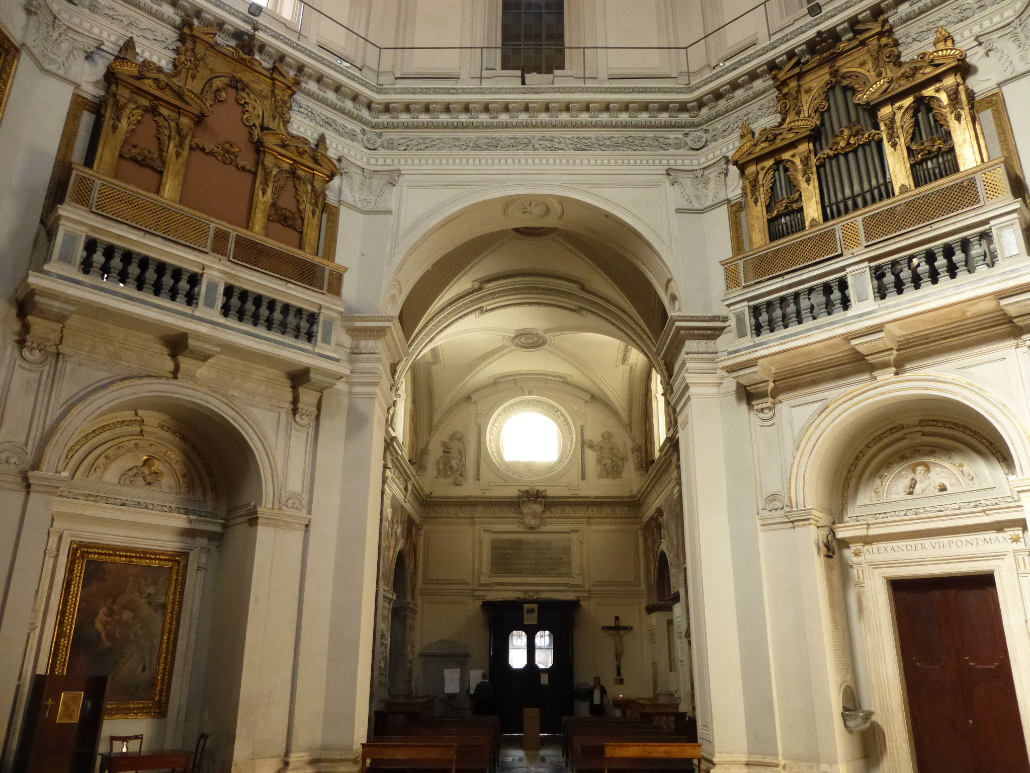 Roma, Santa Maria della Pace, controfacciata.